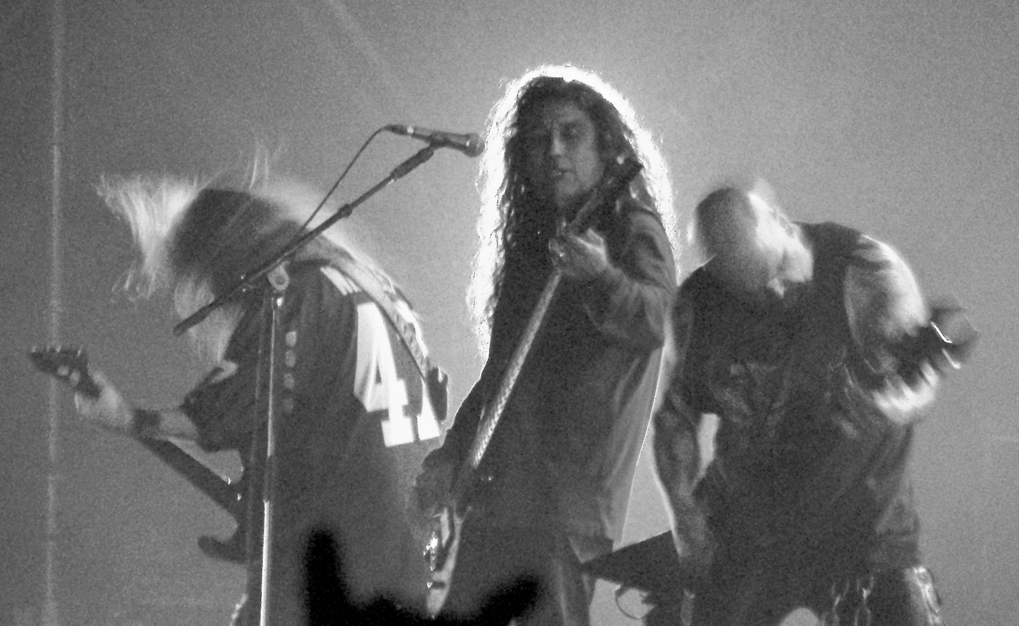 Slayer live at Hellfest 2007